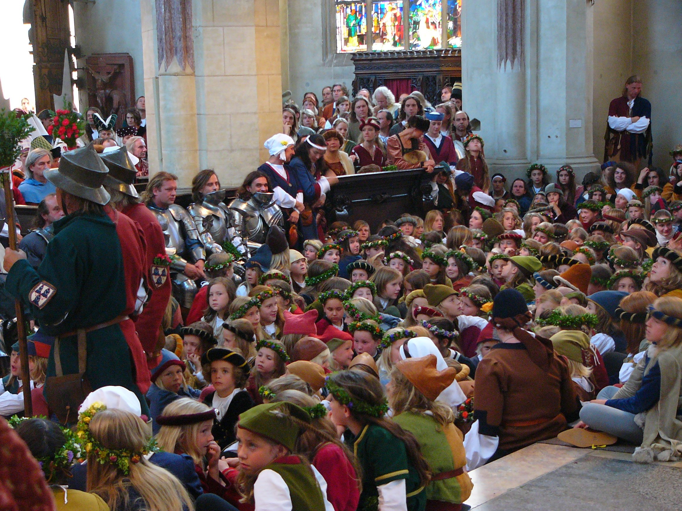 Vor dem Dankgottesdienst der Landshuter Hochzeit.